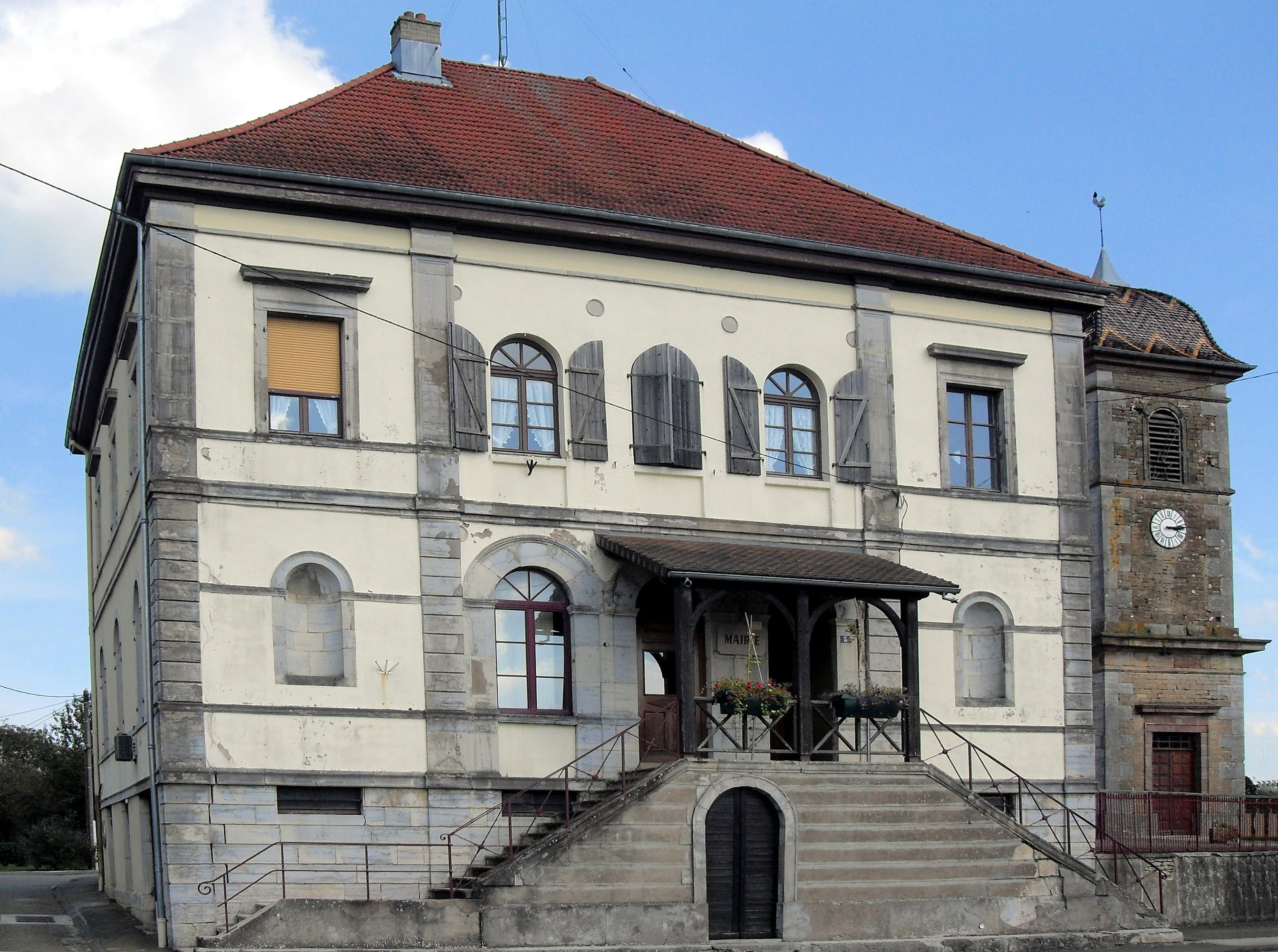 La mairie de la commune de Sainte-Marie